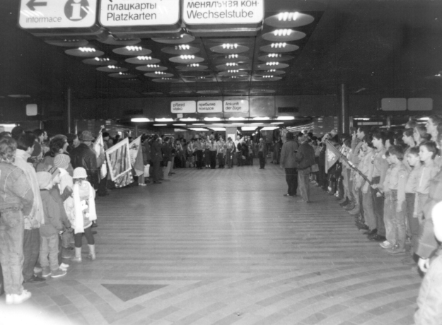 Dne 23.12.1989 oddíl bratří Revilliodových / 43.WPuP, patřící do Českého a slovenského exilového skautingu (a působící současně jako oddíl č.43 Wiener Pfadfinder und Pfadfinderinnen) pod vedením Radka Pavlovce (politického vězně), dovezl poprvé do ČSSR Betlémské světlo, z Vídně do Prahy. Na fotografii je vítají skauti z Prahy a Nové Paky. Členové oddílu bratří Revilliodových jsou na fotografii uprostřed, fotografie vznikla při jejich příchodu od nástupiště.